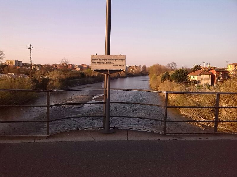 Cartello su ponte che attraversa il fiume Entella e che riporta i versi della Divina Commedia: «Intra Siestri e Chiaveri s'adima una fiumana bella.» (Purgatorio, canto XIX)